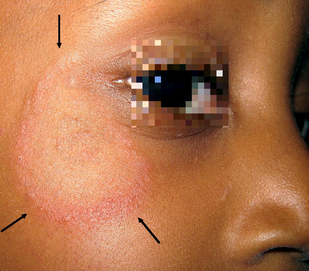 Herpès circiné (= mycose de la peau glabre = épidermophytie) du visage, encadré par les flèches noires.